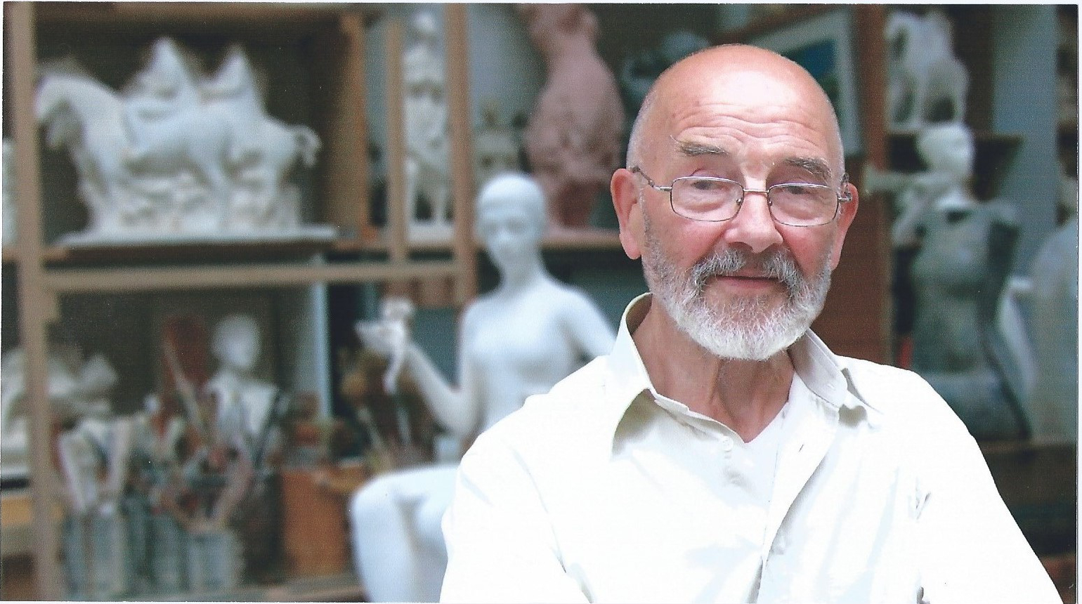 Photo Emmanuelle Tresarrieu